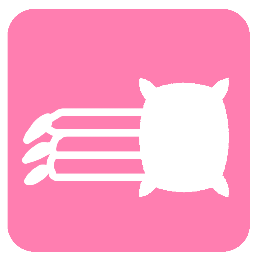 Símbolo utilizado para identificar a la estación Rengo en 2001.